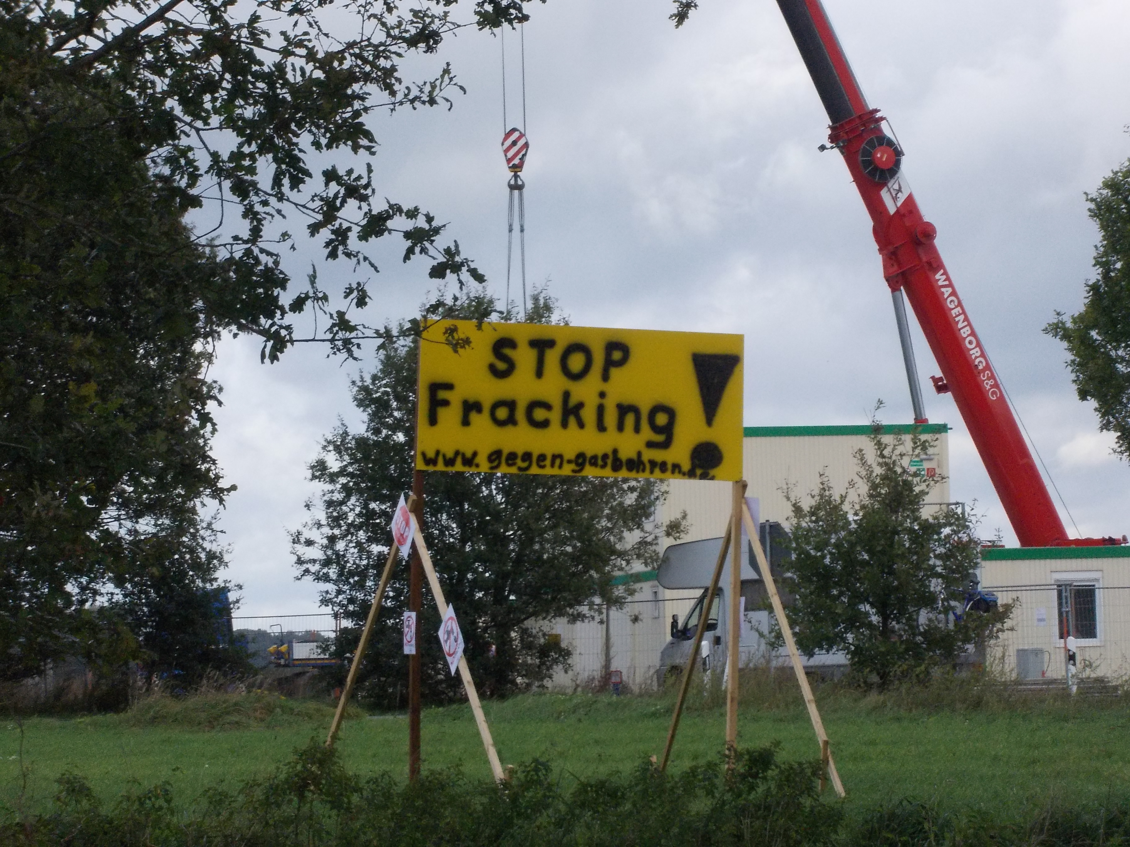 ITAG Rig 27 auf Bohrung Bötersen Z11, ExxonMobil